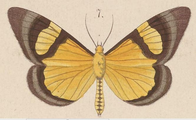 Celerena mutata Walker, 1865